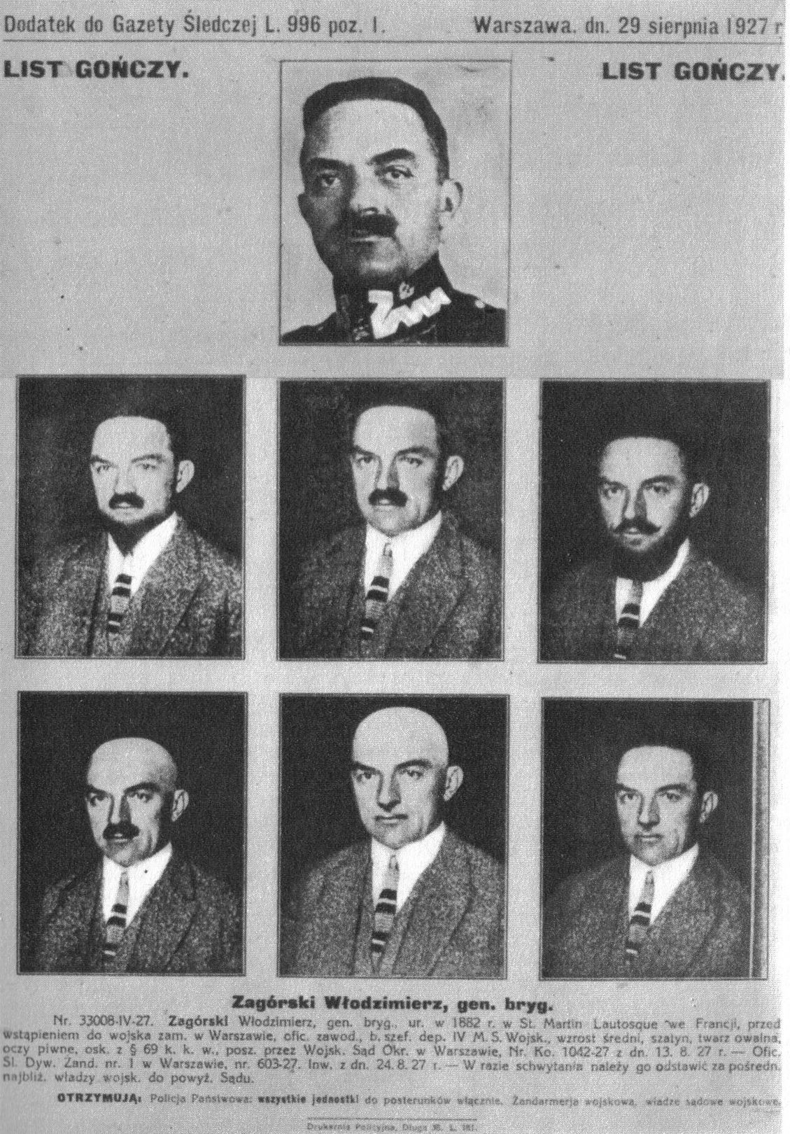 List gończy za gen. Włodzimierzem Zagórskim.